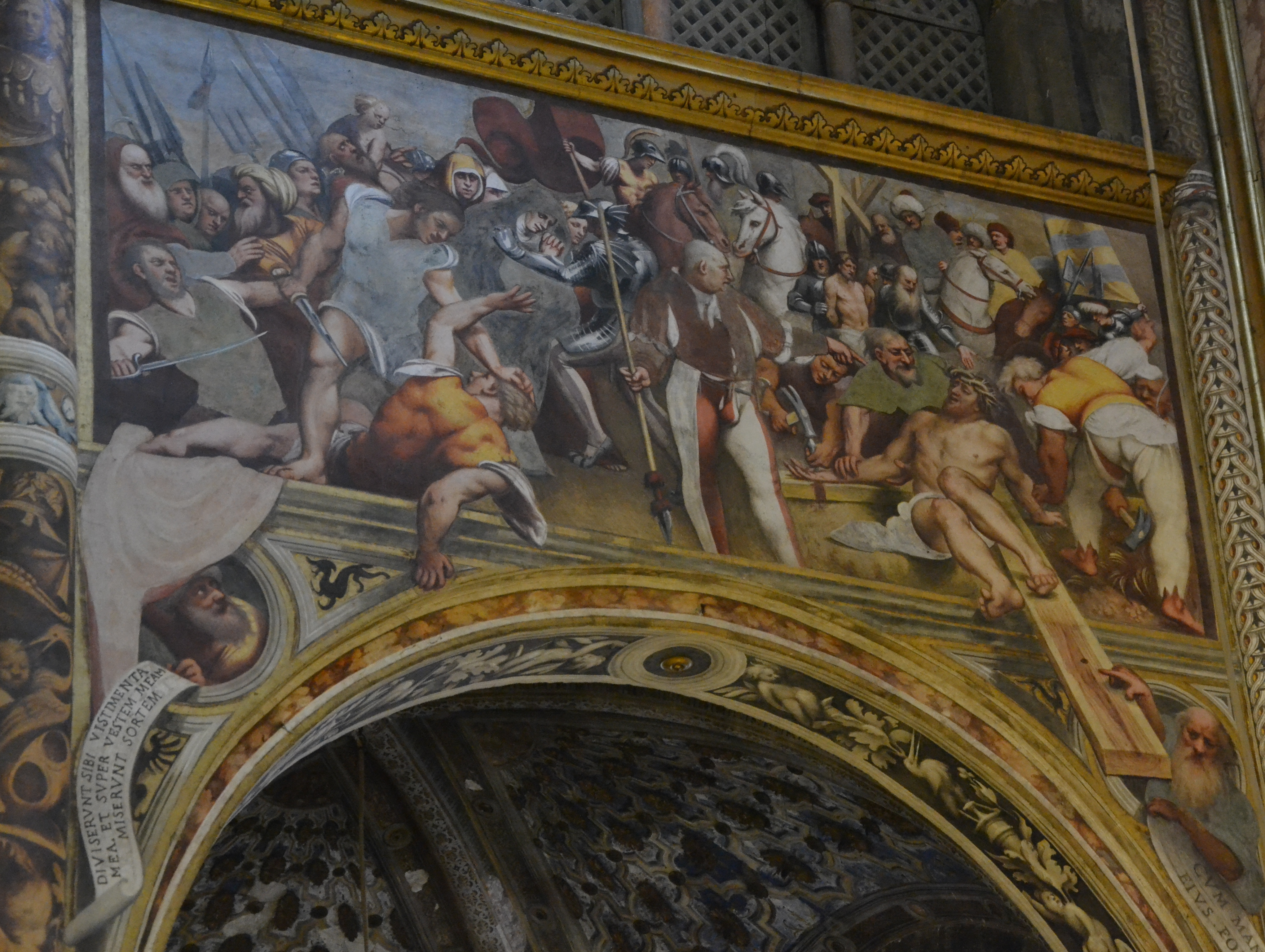 Cristo inchiodato alla Croce, 1521, Giovanni Antonio de' Sacchis detto il Pordenone (Pordenone, 1483 – Ferrara, 14 gennaio 1539) - Duomo (Cremona) - affreschi della navata principale (XVI secolo)